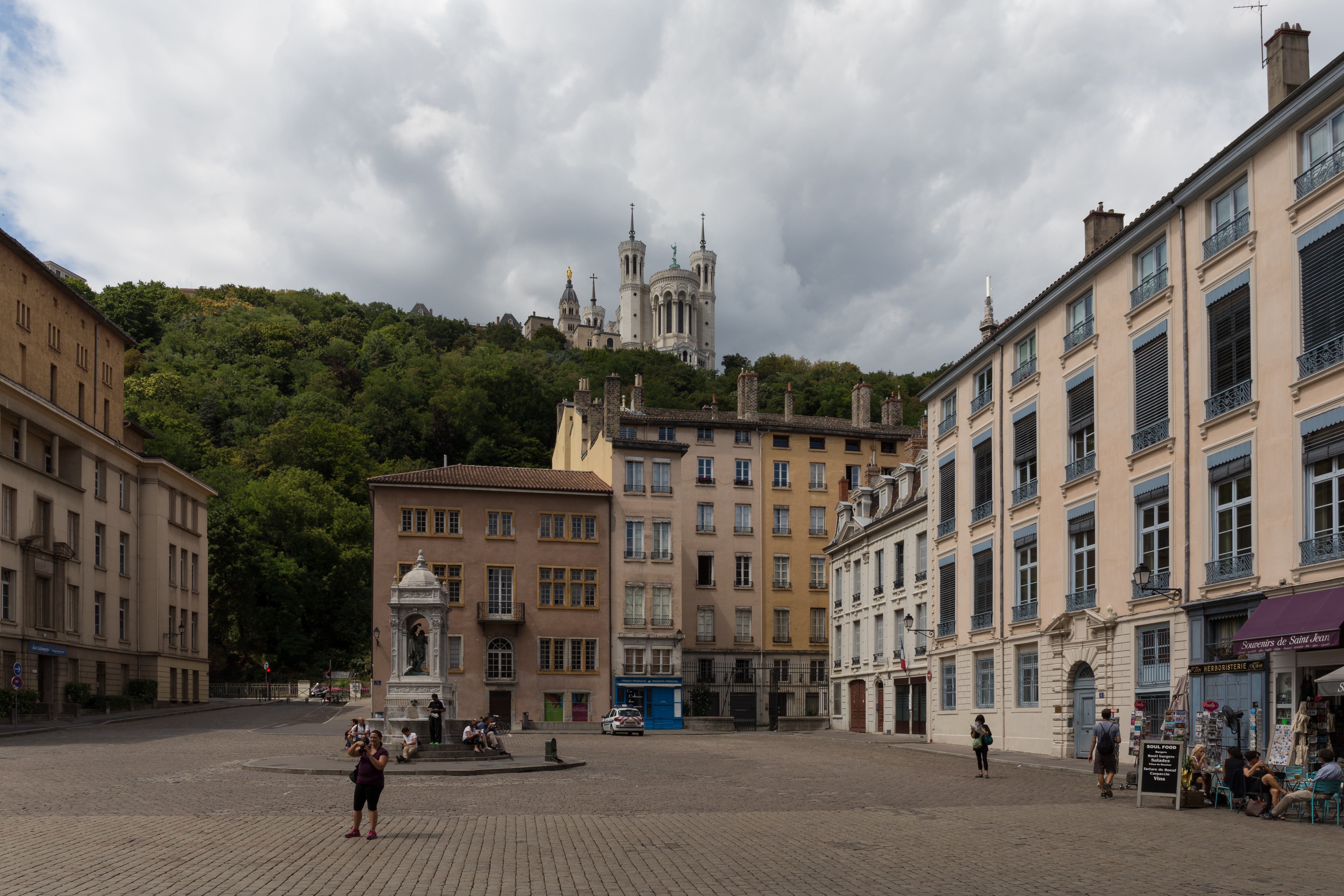 Maisons, 3 à 8 place Saint-Jean dans le 5e arrondissement de Lyon. .